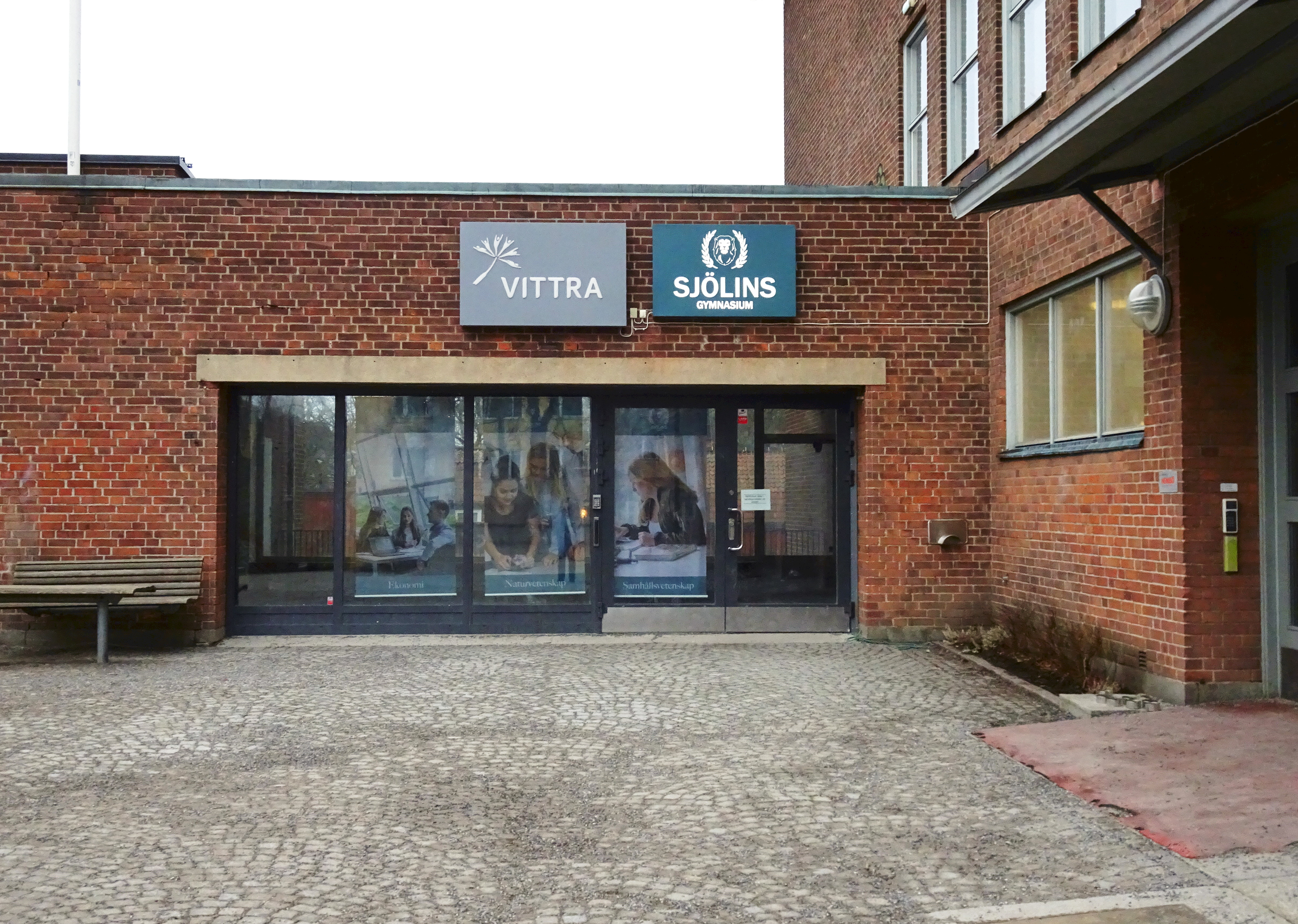 Hantverksinstitutet, Stockholm, arkitekt Robert Berghagen